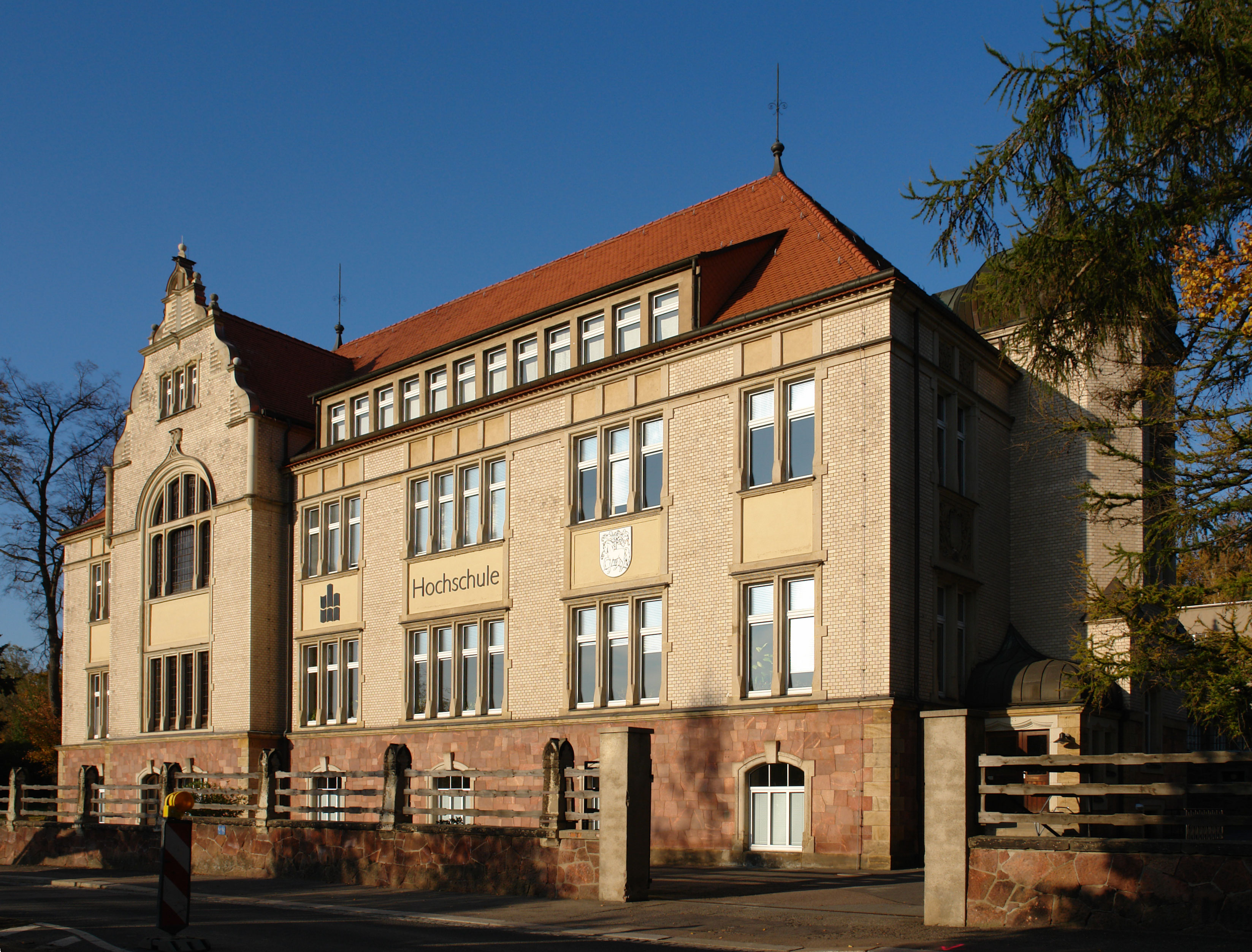 HTW Mittweida Standort Roßwein